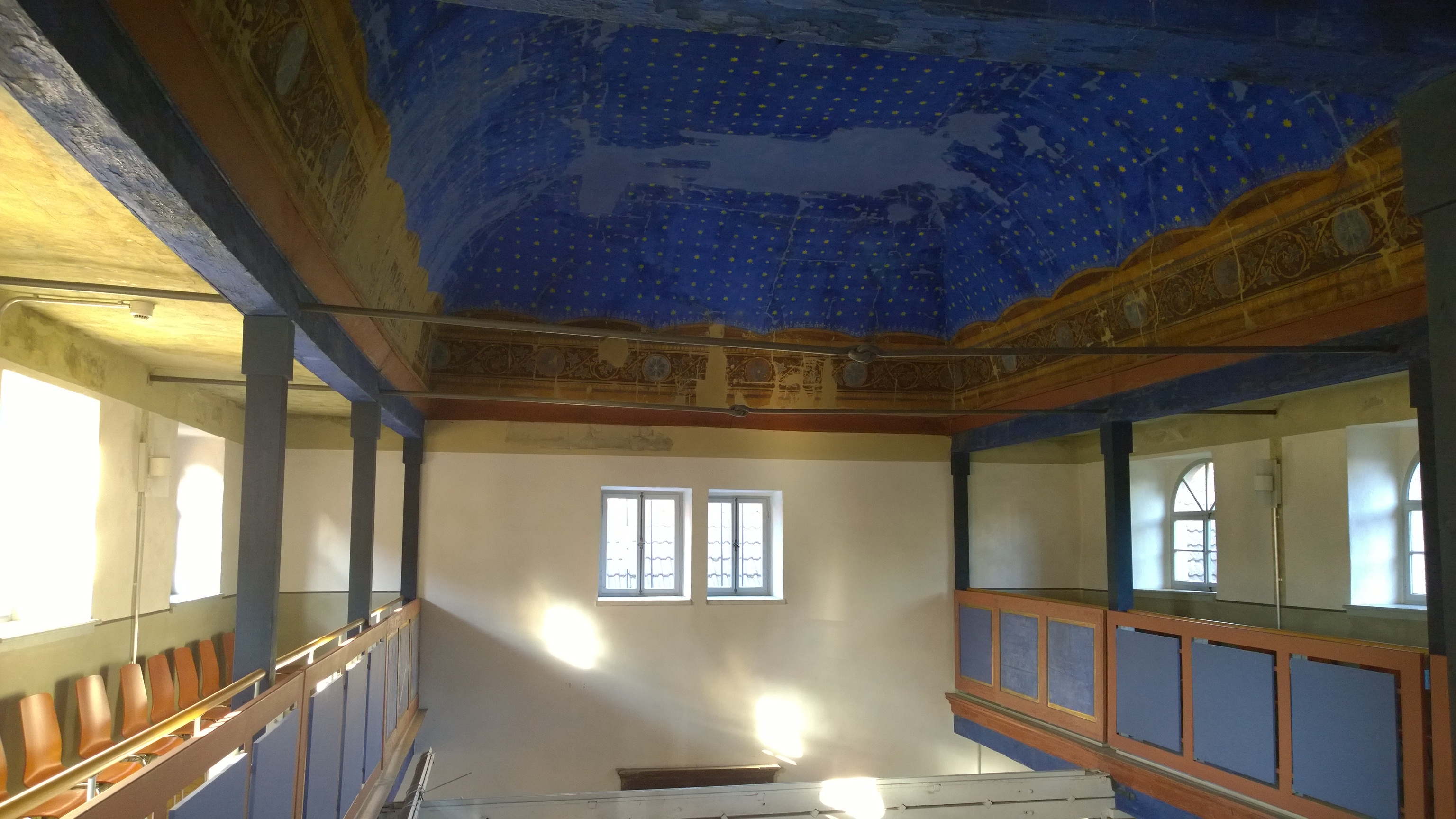 Innenraum der Ehemaligen Synagoge Pfungstadt, restauriert.